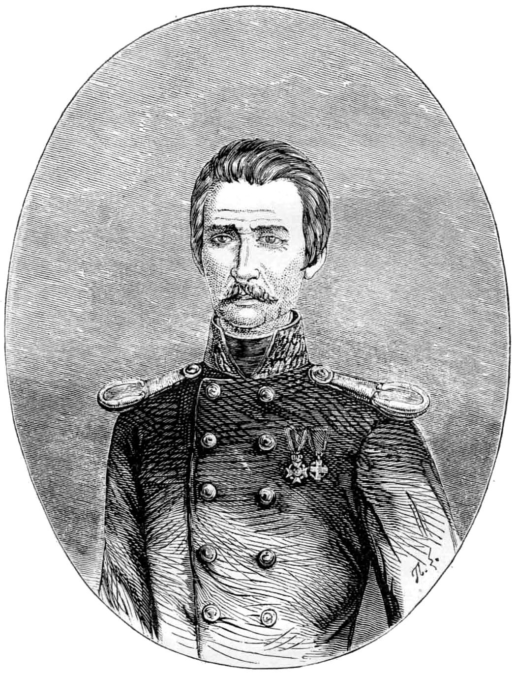 Εικόνα του Γεωργίου Ζαλοκώστα, από τη σελ. 2 των Απάντων του που εκδόθηκαν το 1873 από τον Ευγένιο Ζαλοκώστα